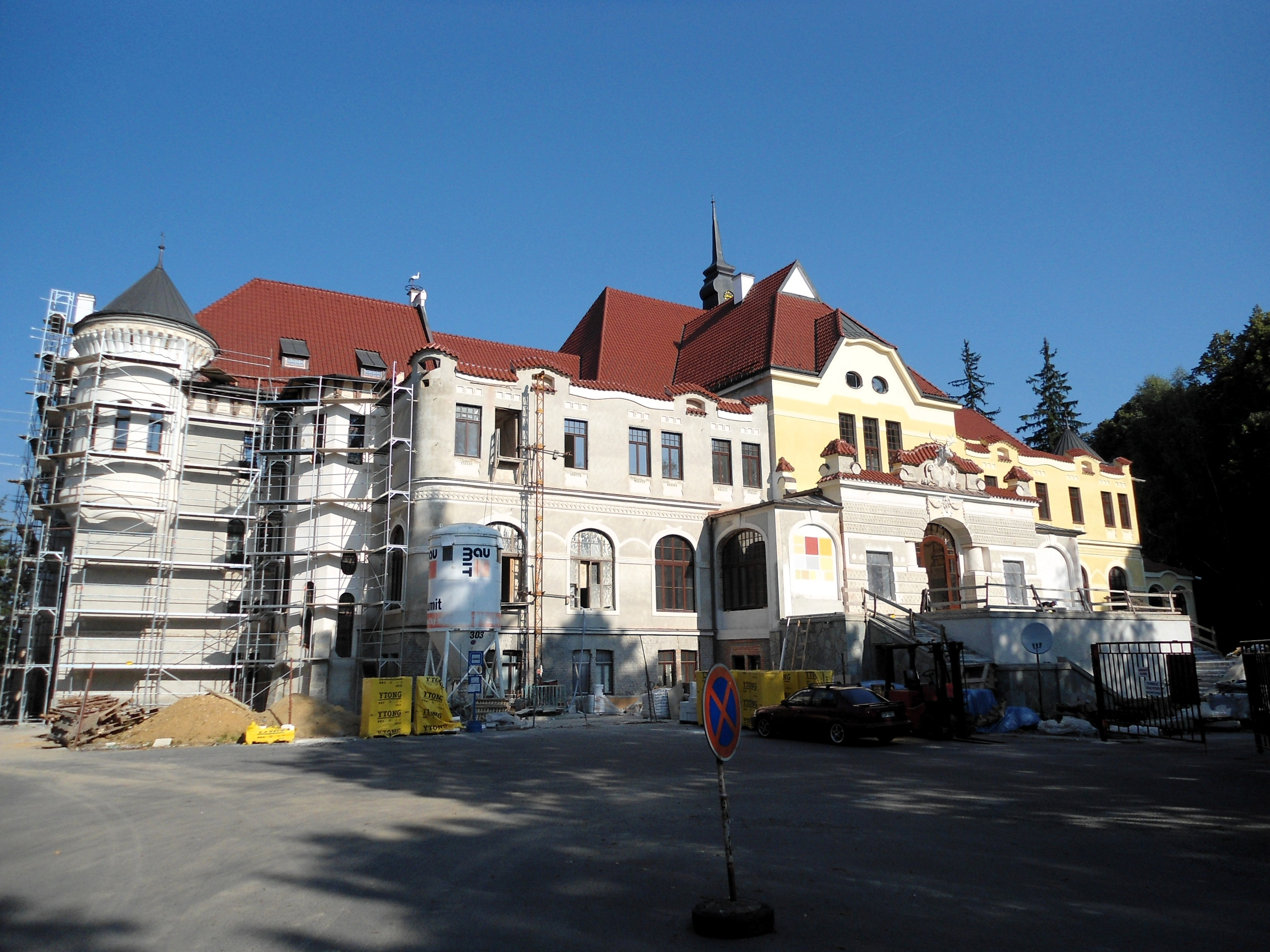 Hotel Juniorhotel Krakonoš (Zádub), Zádub